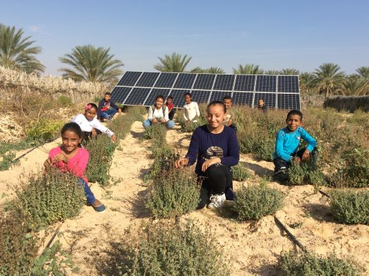 bircharef